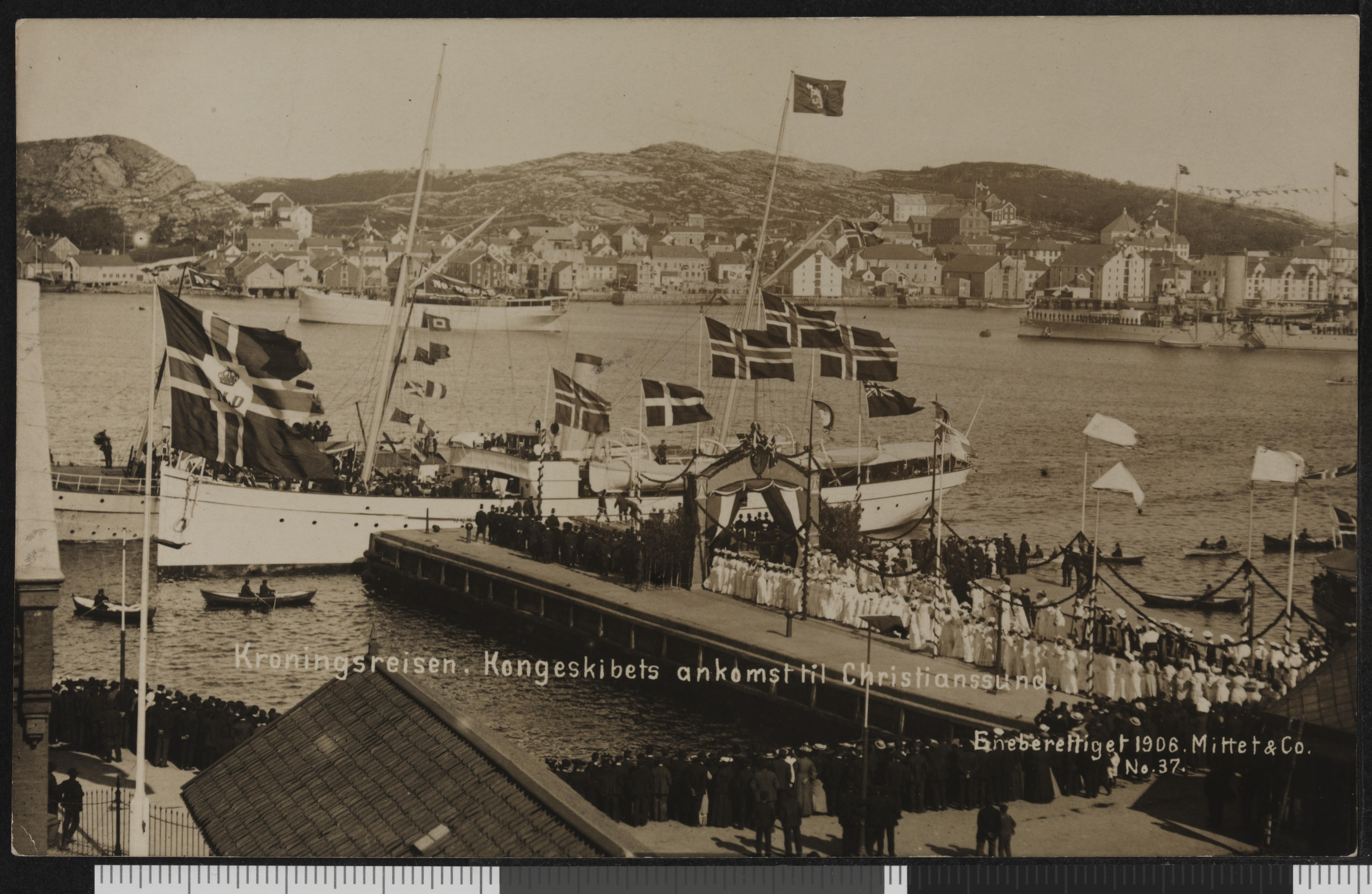 Bildet er hentet fra Nasjonalbibliotekets bildesamling Kristiansund, Møre og Romsdal